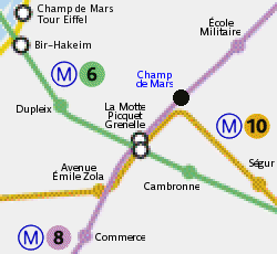 Extract from Image:Paris Metro map.gif. en: Locations of Champ de Mars Paris metro ghost station. fr: Localisation de la station fantôme du métro de Paris Champ de Mars.